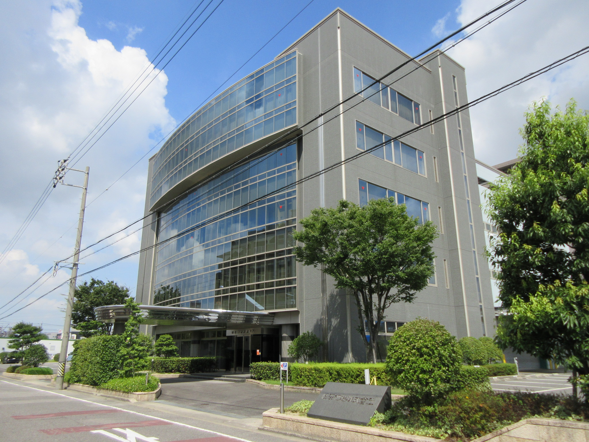 峰澤鋼機株式会社 本社（岡崎市井田南町）